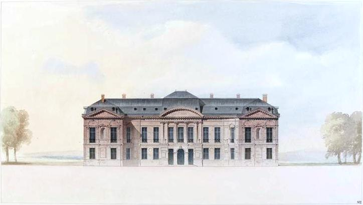 Façade d'entrée du château de Bercy à la veille de sa destruction. Paris, musée du Louvre, D.A.G. Architecture 2005, don, François-Joseph Graf. RF54241-recto.